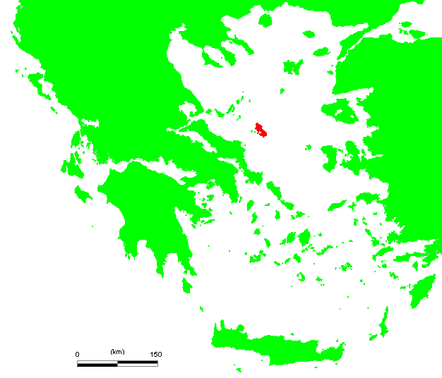 GR Skyros.PNG (Greek island)